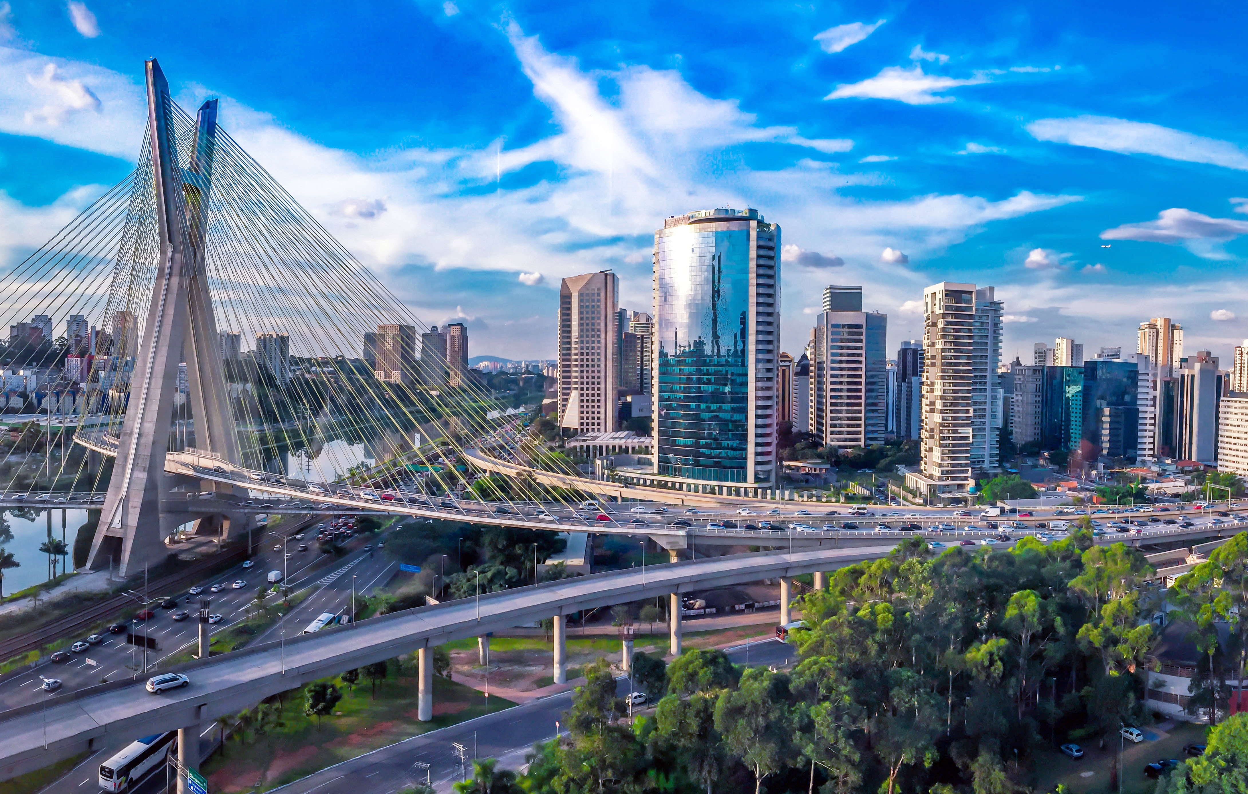 Ponte Octávio Frias de Oliveira e Centro Empresarial Nações Unidas (CENU).